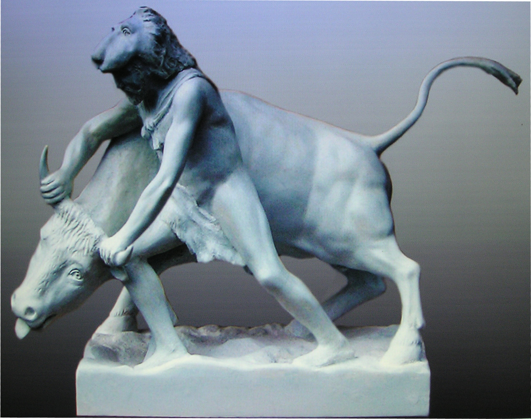 Estatuilla que representa la lucha de Heracles con el toro de Creta, de 60 por 78 y por 30 cm. aproximadamente. Realizada por J. M. Fëlix Magdalena.